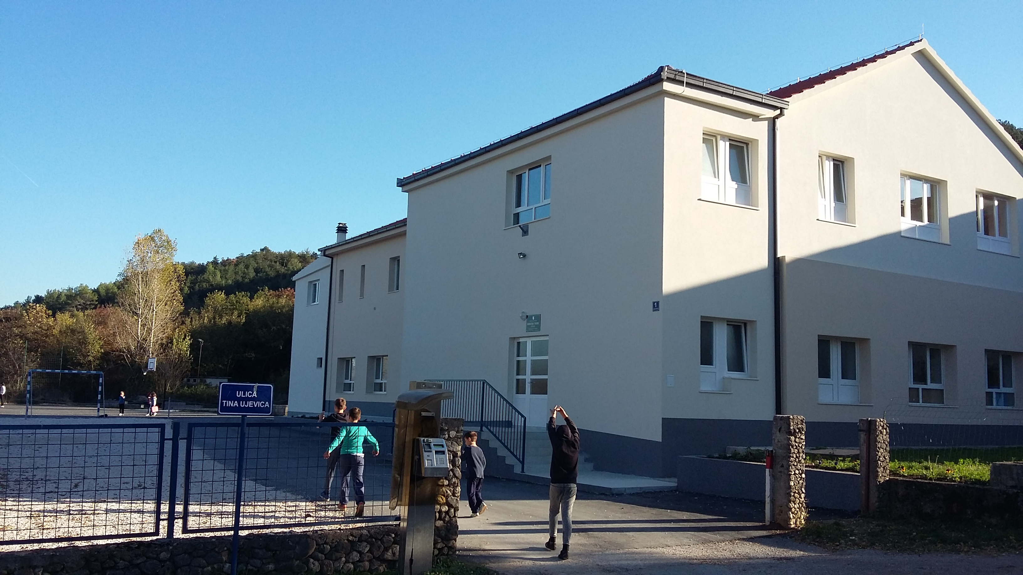 Područna škola u Mračaju nakon obnove